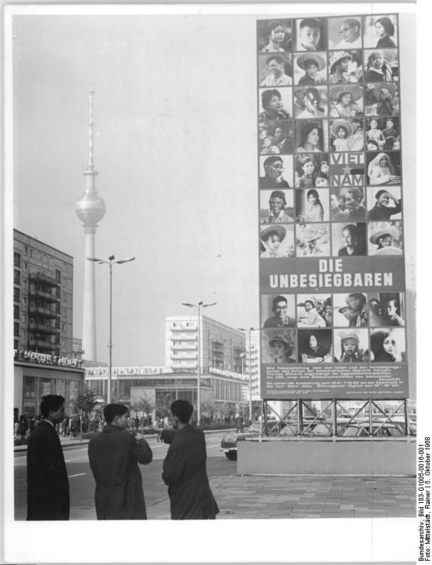 Berlin, Karl-Marx-Allee, Werbung Vietnam-Fotoausstellung Zentralbild Mittelstädt ch 5.10.1968 Berlin am Vorabend des 19. Jahrestages der Republik Weithin sichtbar in der Berliner Karl-Marx-Allee ist dieser Aufruf zur Solidarität mit Vietnam. Er lädt Berliner und ihre Gäste zum Besuch der Vietnam-Fotoaustellung des Berliner Bildreporters Thomas Billhardt ein.